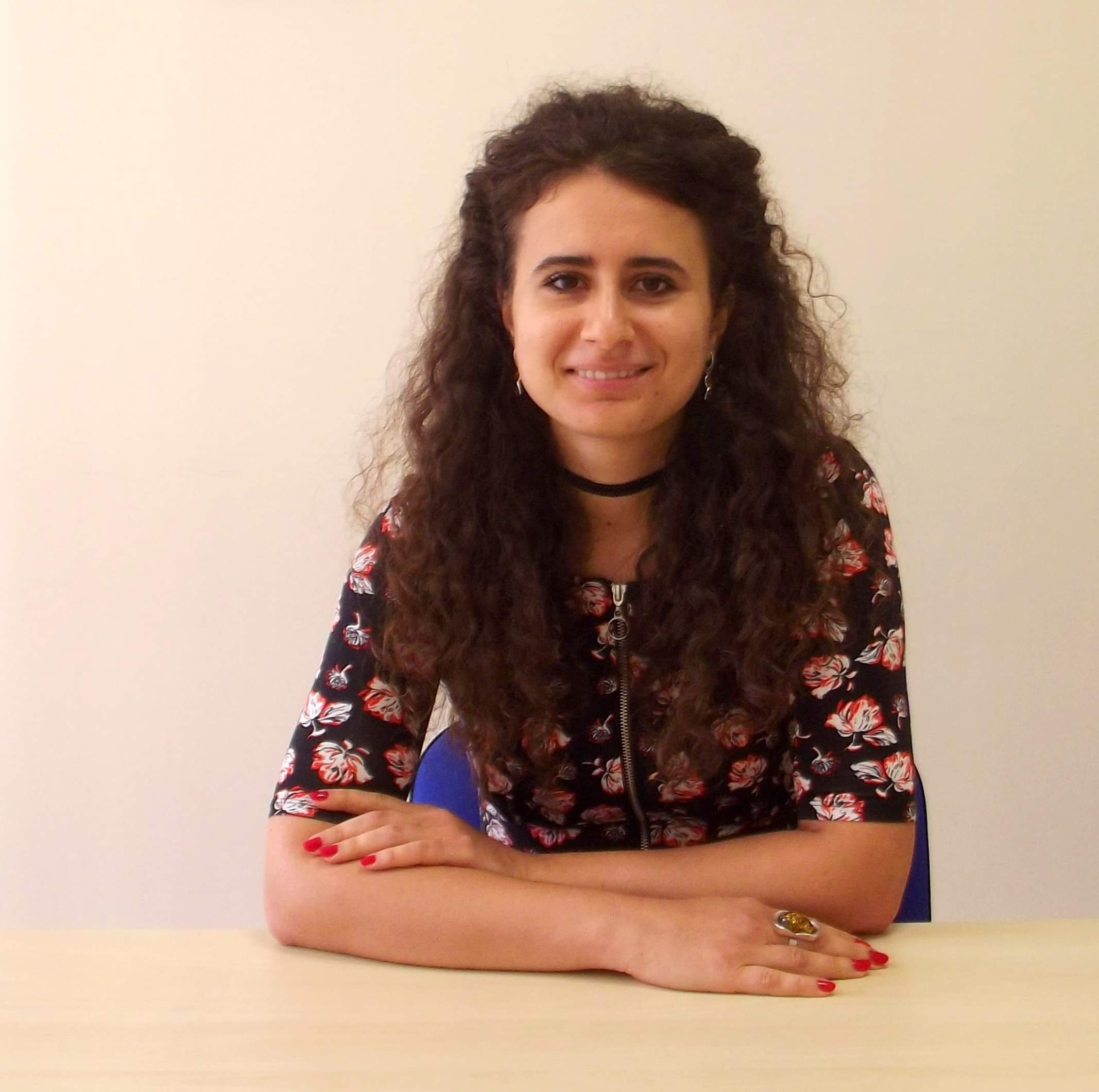 Jolanta Nawrot, polska poetka